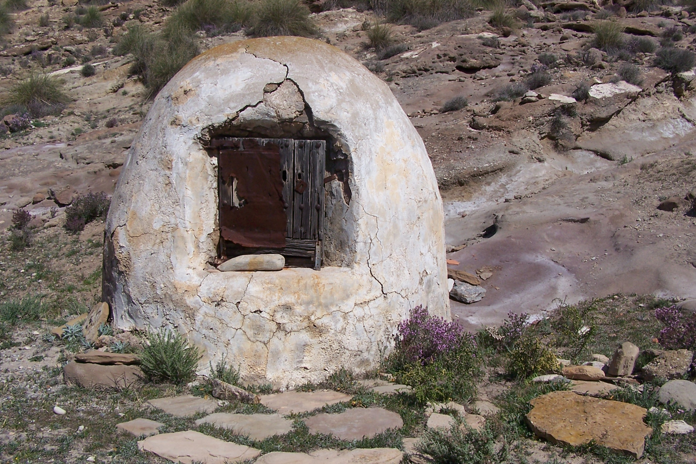 Eigen werk ; Aljibe